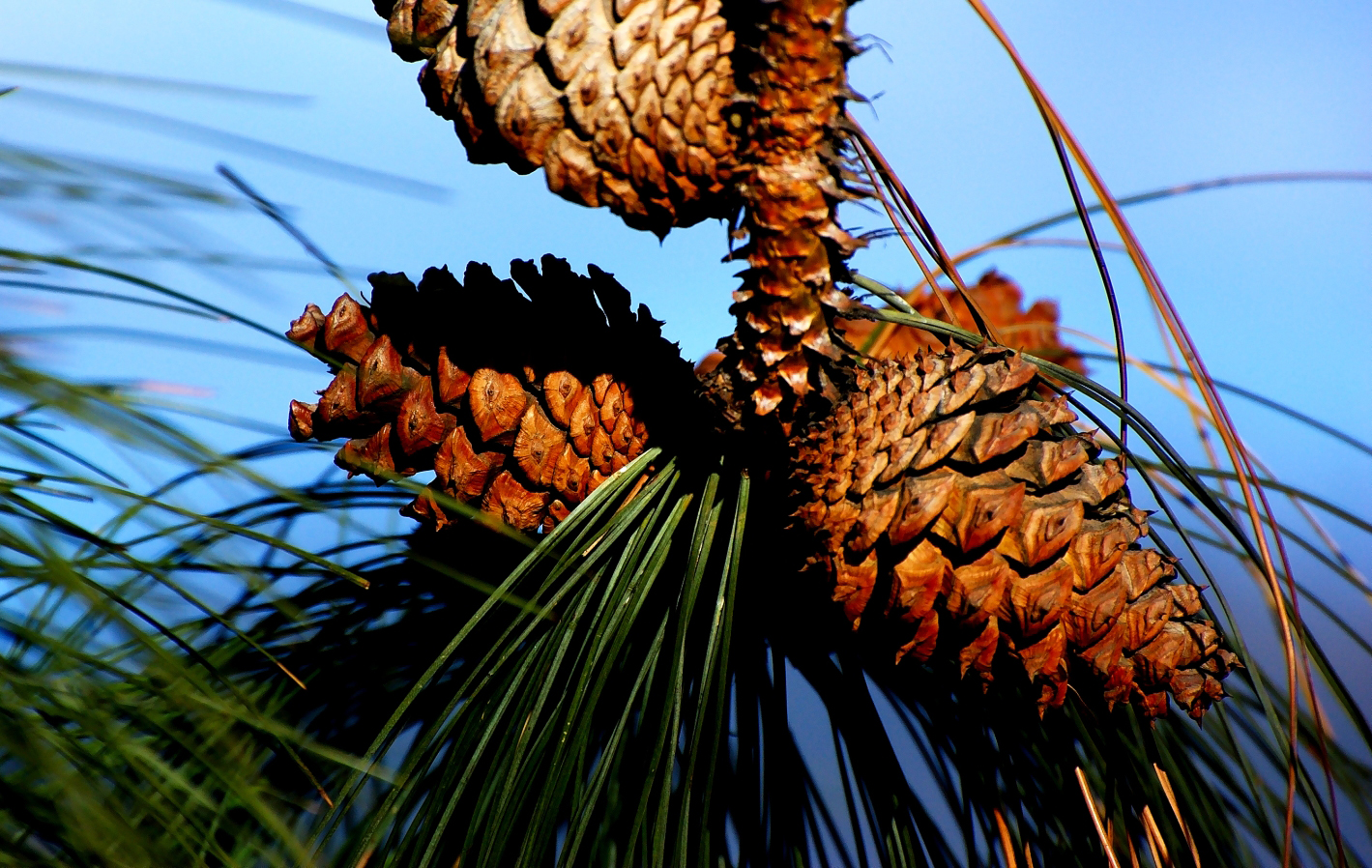 Pinus ponderosa subsp. ponderosa cones. Penticton, BC, Canada.